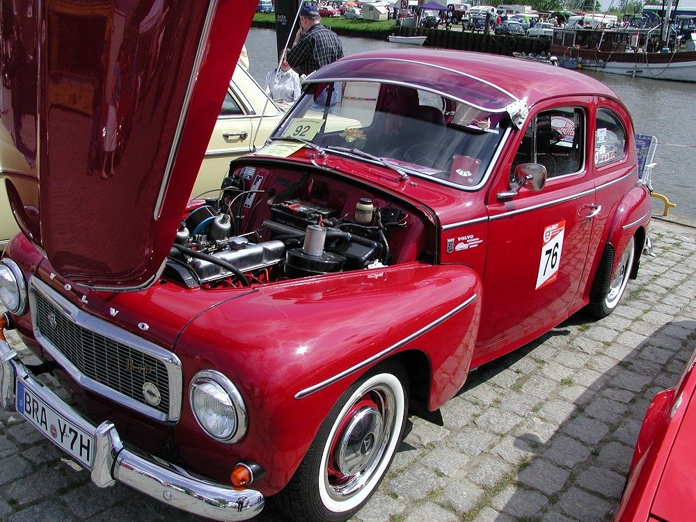 Volvo PV544 CGI Sport, 1965 - Buckelvolvo